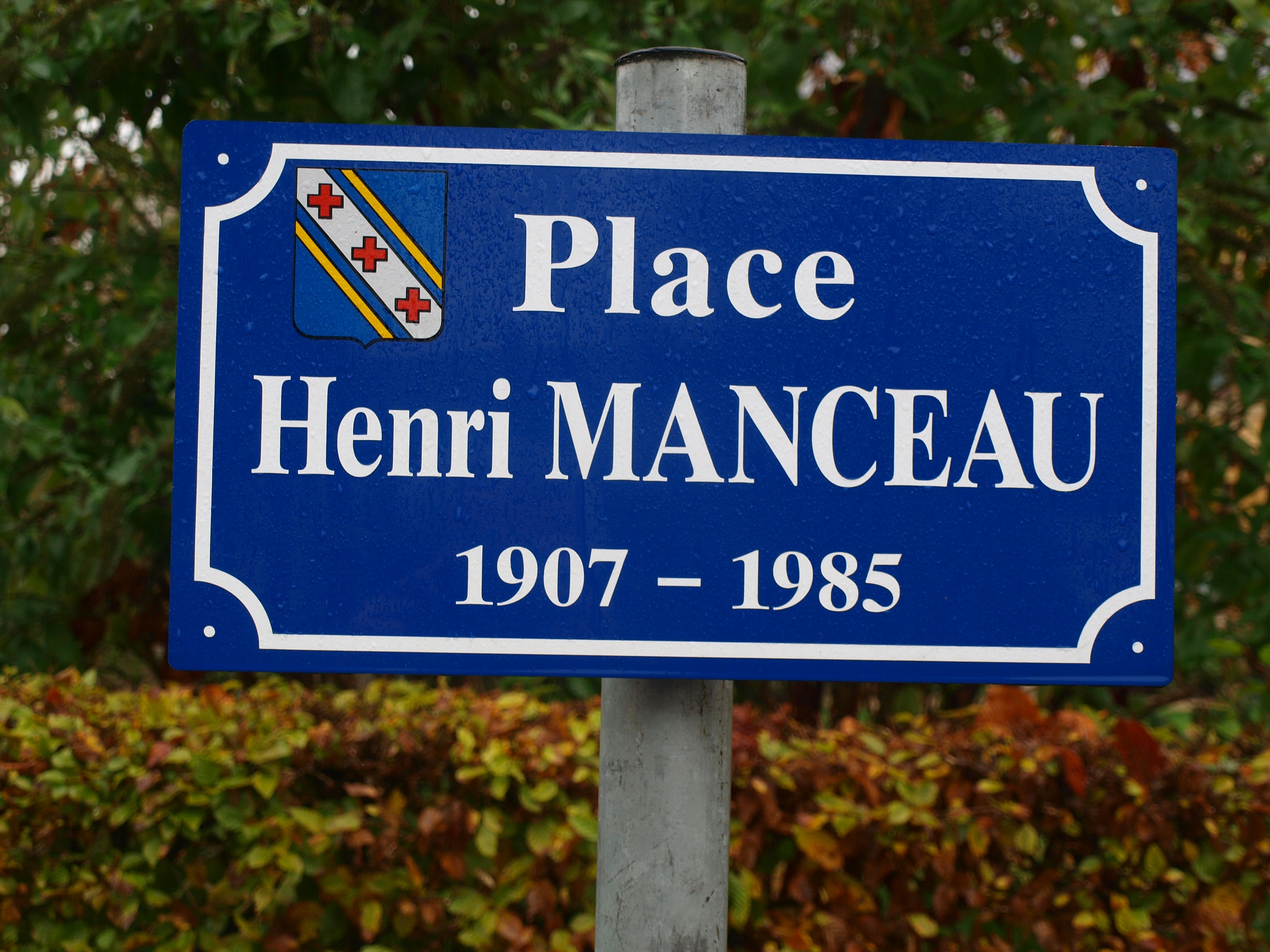 Marquigny (Ardennes, France) ; panneau de la place Henri Manceau